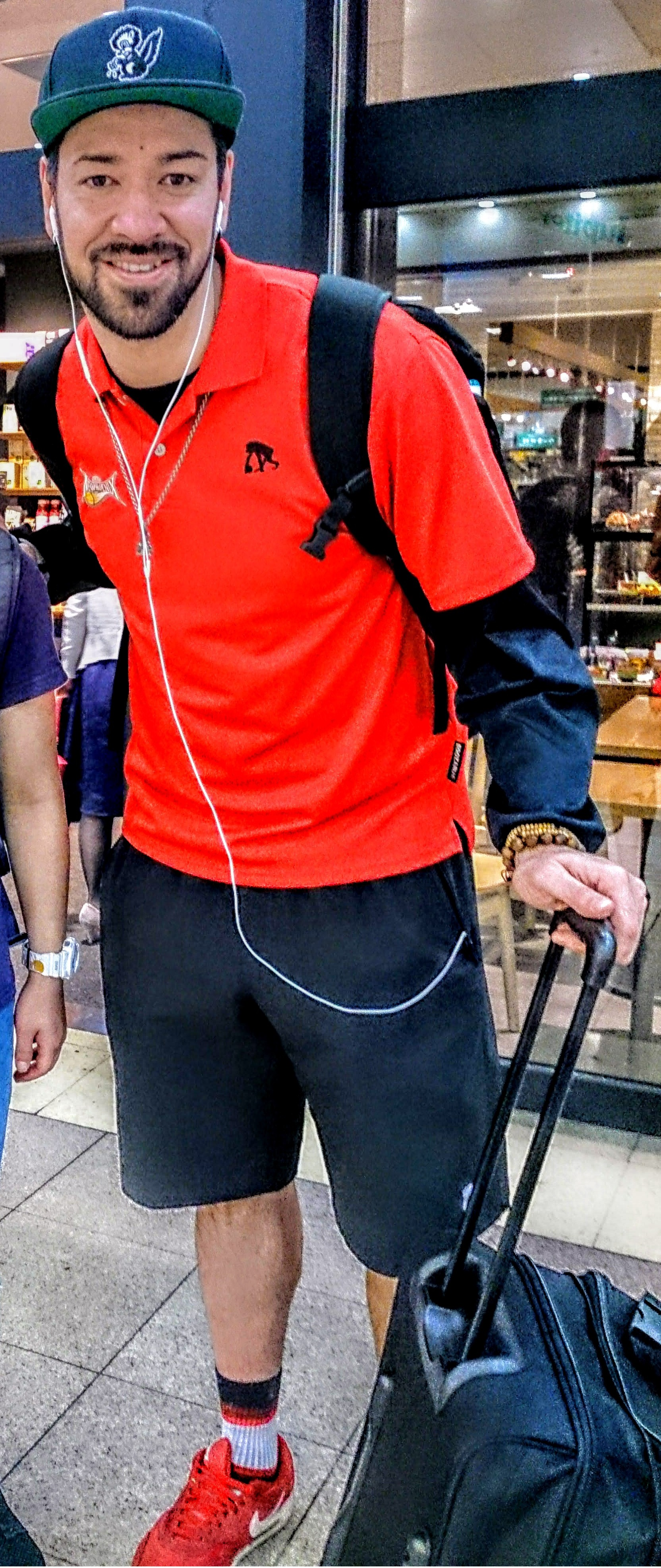 比留木 謙司（長岡市にて）